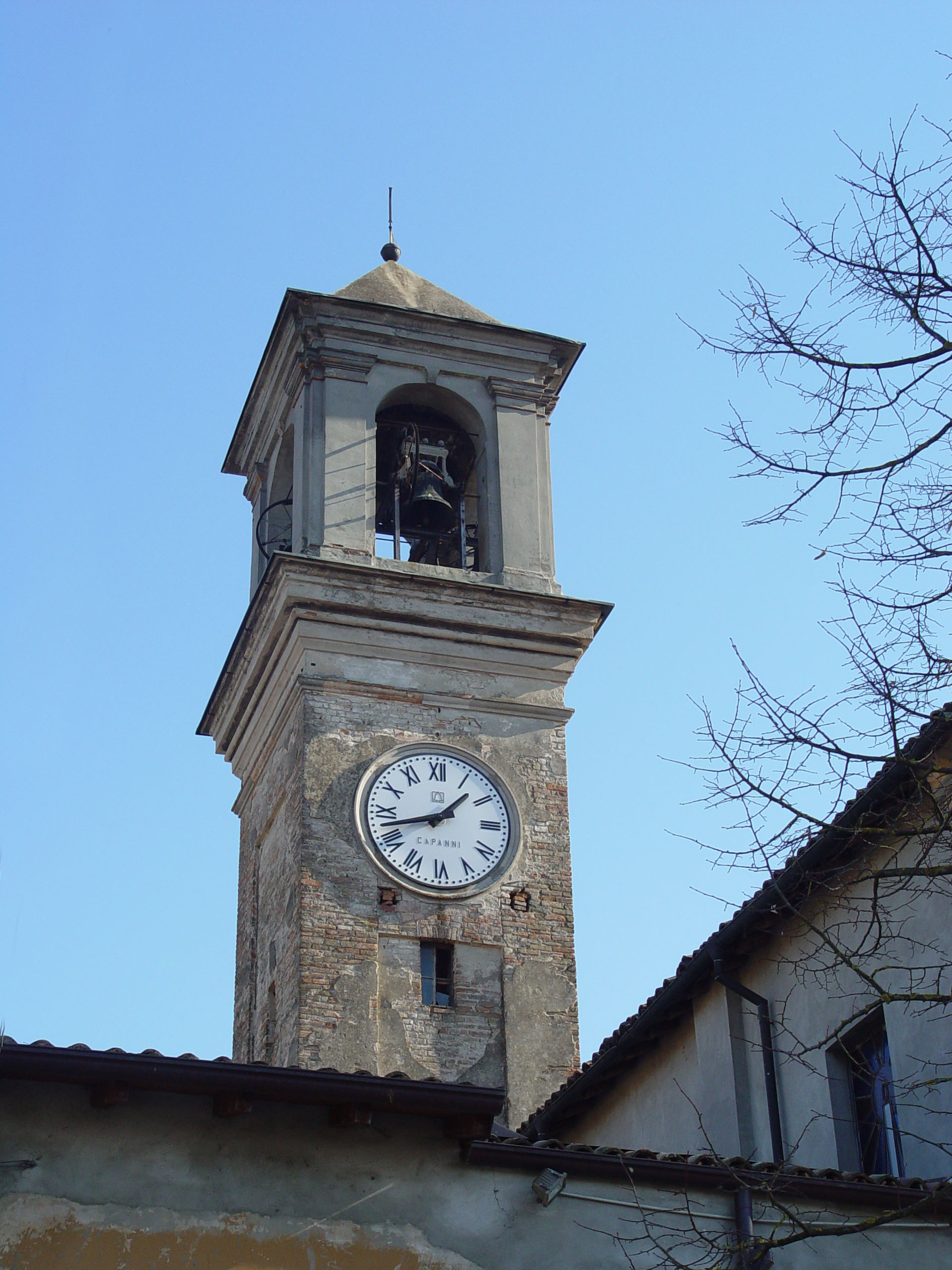 Description Chiesa di San Rocco a Vicomero di Parma. Date 11 Febrraio, 2006 Location Vicomero, Parma - Italy Photographer Franco Folini